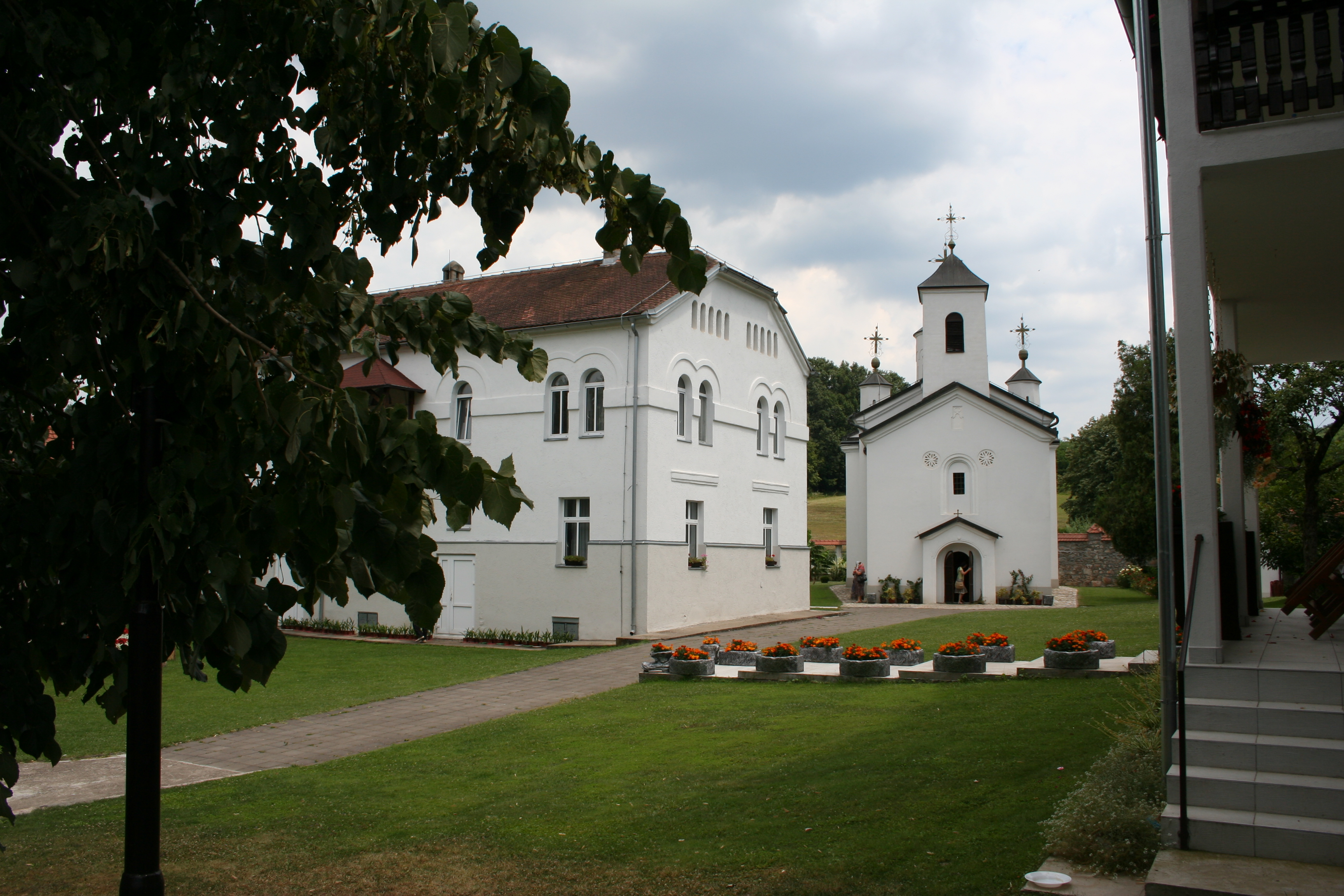 Manastir Čokešina